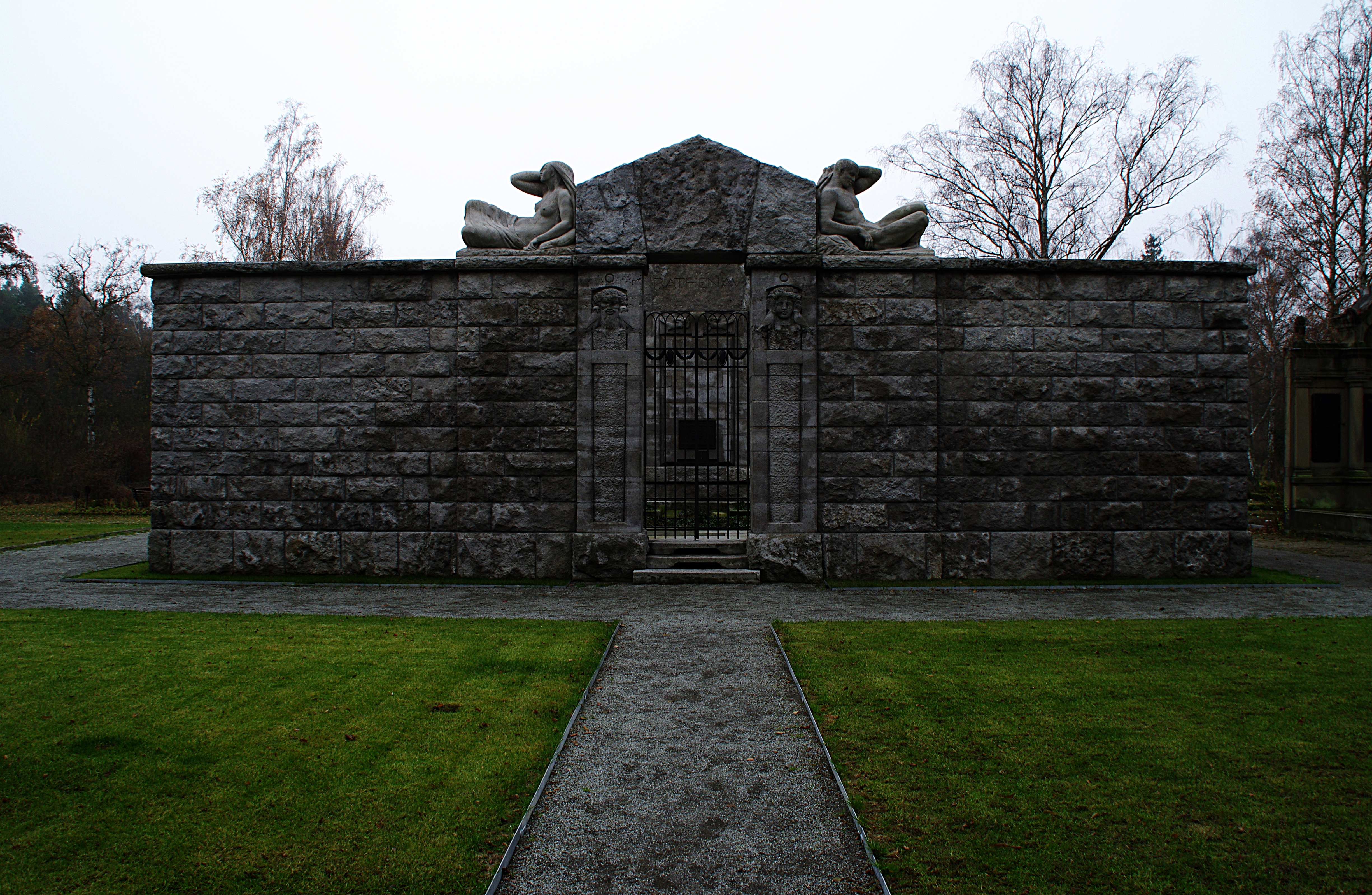 Berlin-Oberschöneweide. Das Grabmal für Walther Rathenau, befindet sich auf dem Waldfriedhof Oberschöneweide und steht unter Denkmalschutz.